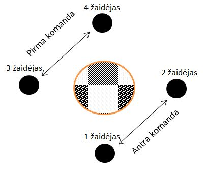 Trismūgio komandų išsidėstymas